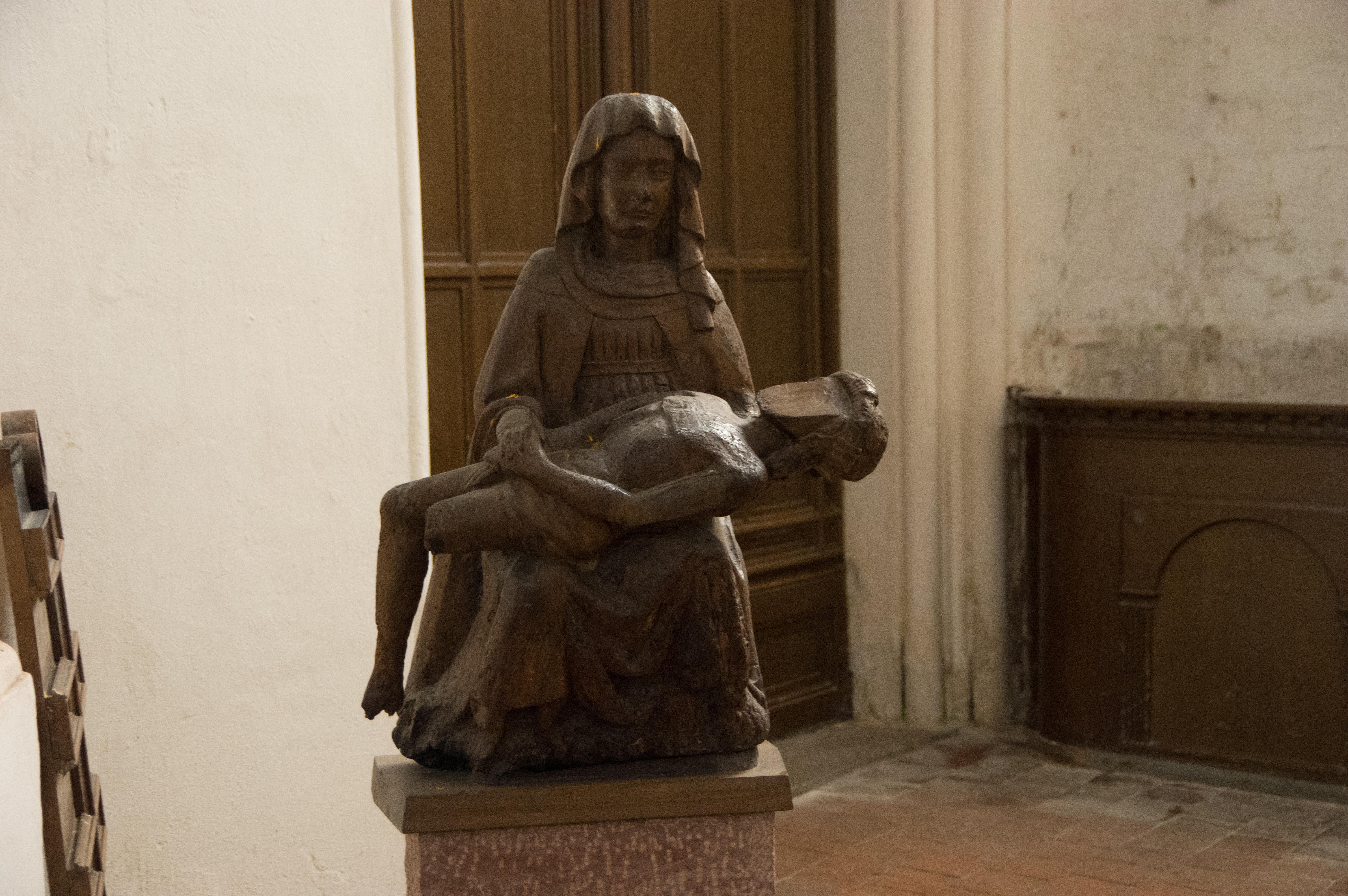 Grimmen in Mecklenburg-Vorpommern. Die Kirche in Grimmen steht unter Denkmalschutz. Pieta aus dem 15. Jahrhundert.